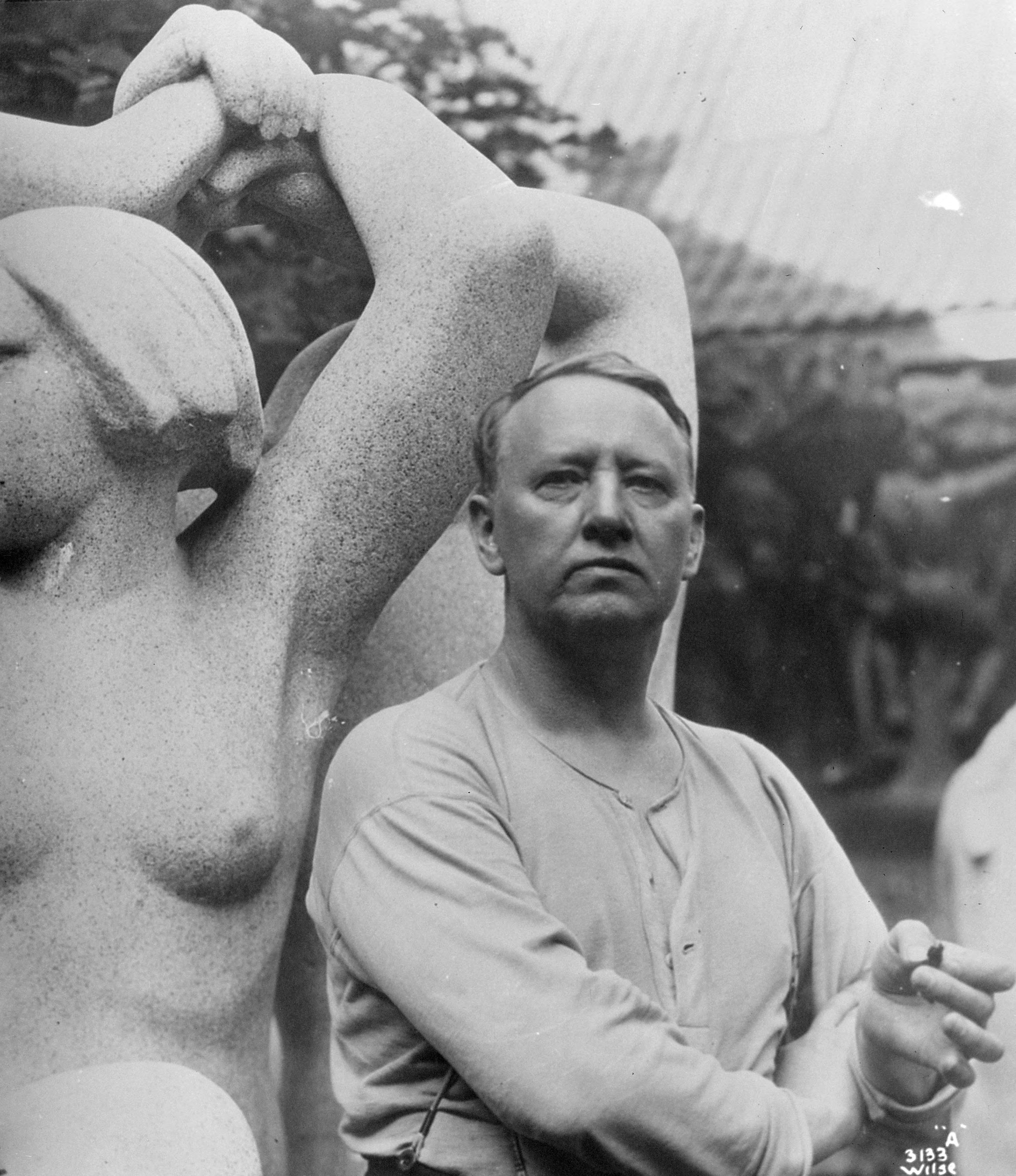 Norwegian sculptor Gustav Vigeland.